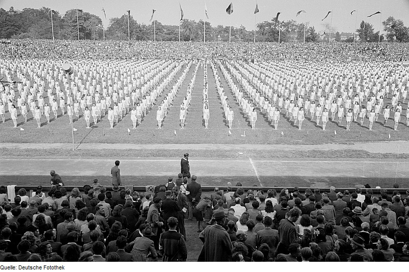 Original image description from the Deutsche FotothekFrauen in Reihe